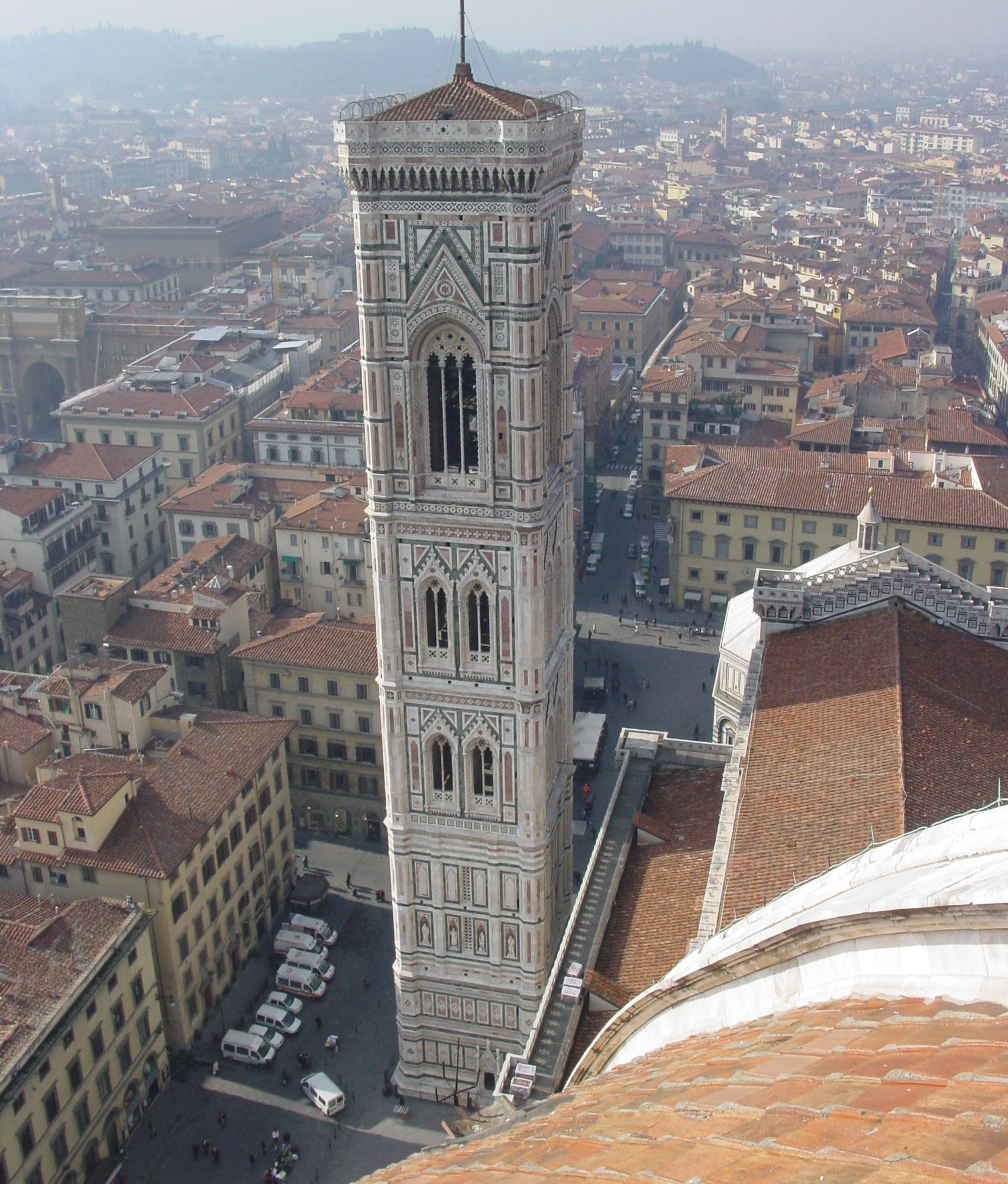 Le campanile de Giotto, vu du haut du dôme de Santa-Maria-del-Fiore. Florence. (simple recadrage du fichier "Campanile Giotto.jpg.jpg" importé par @Dariuz borghigiano)